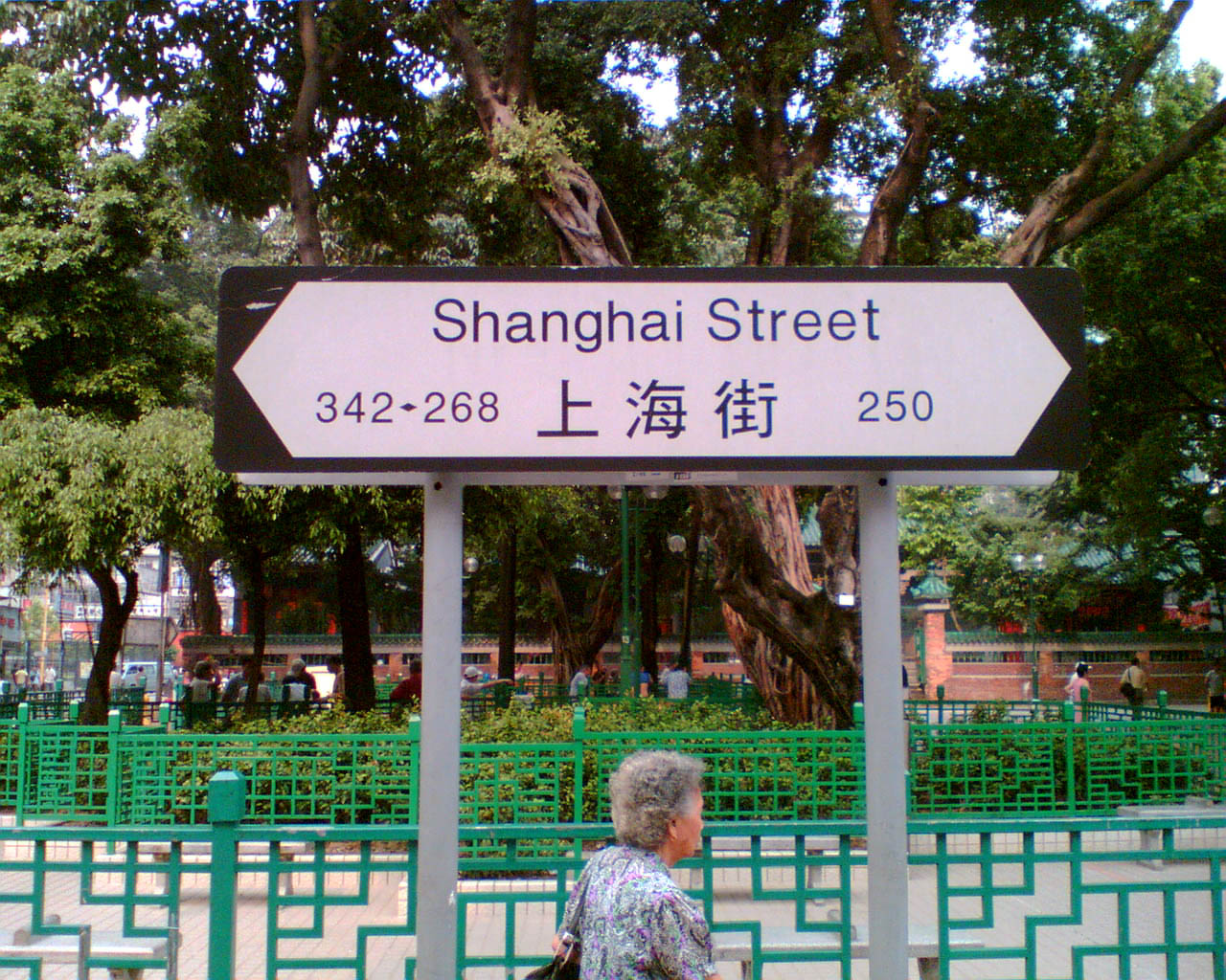 上海街近榕樹頭